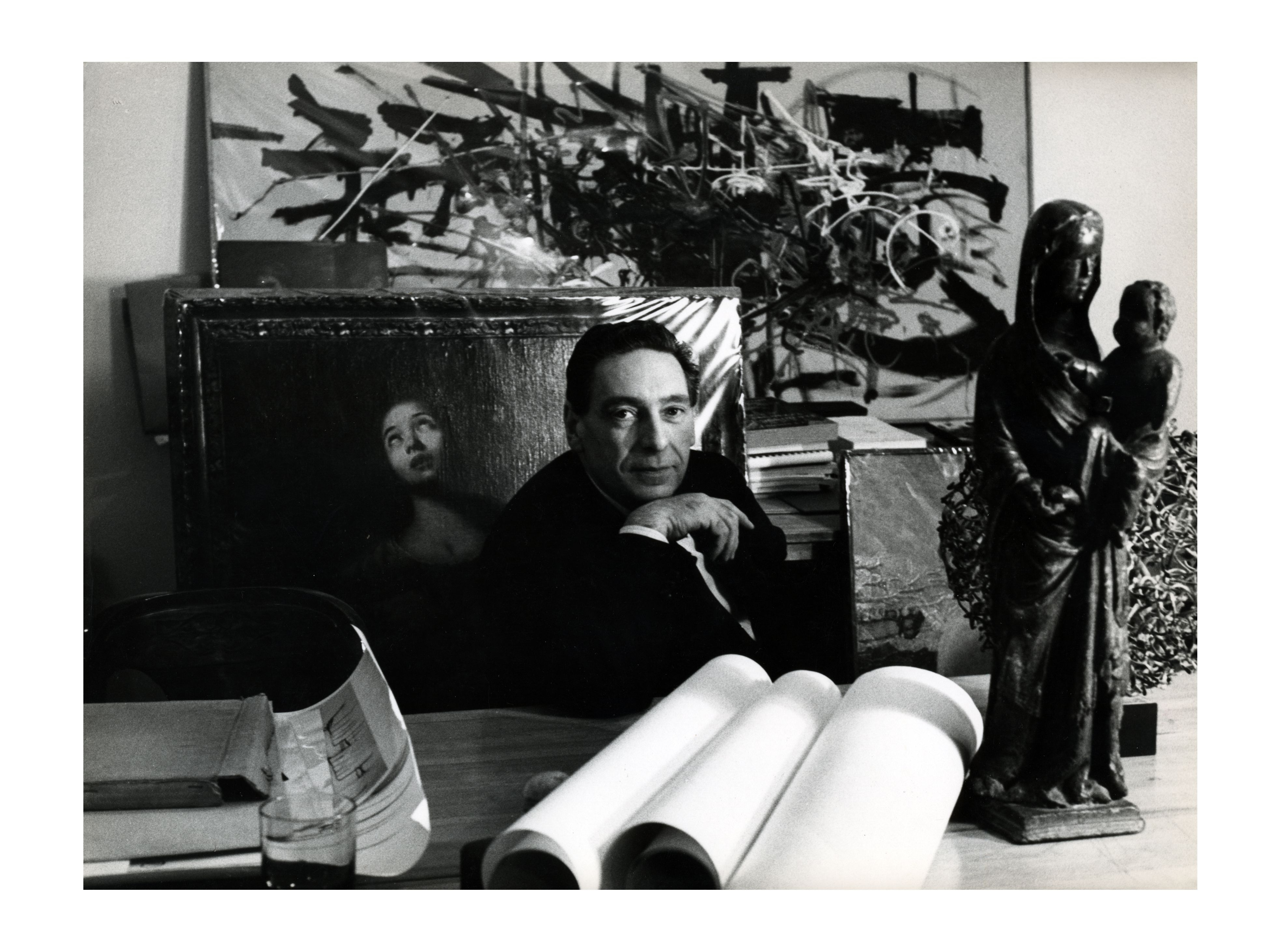 Arch. Luigi Moretti (1906-1973)